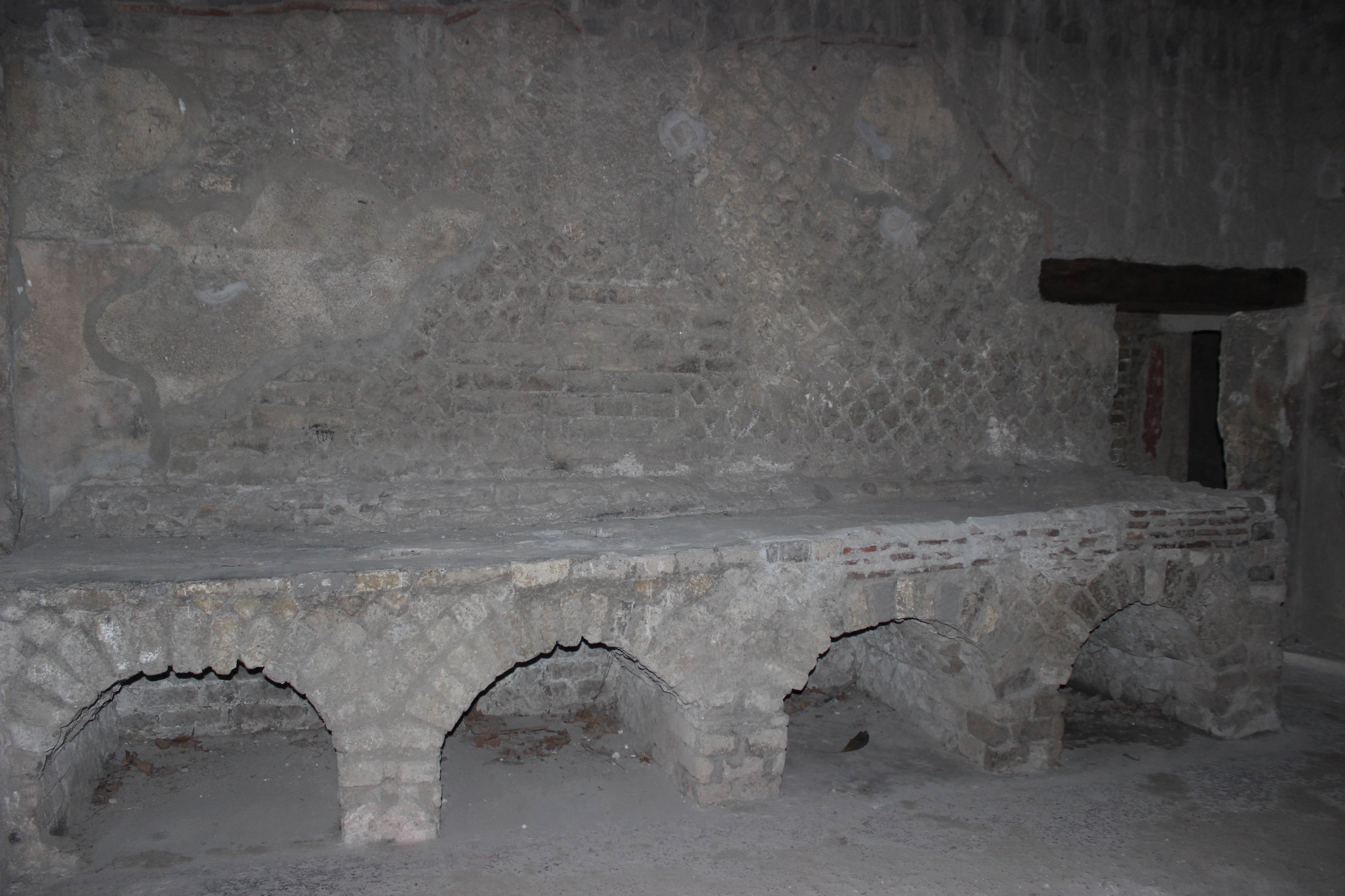 Villa San Marco (Castellammare di Stabia). Cocina.